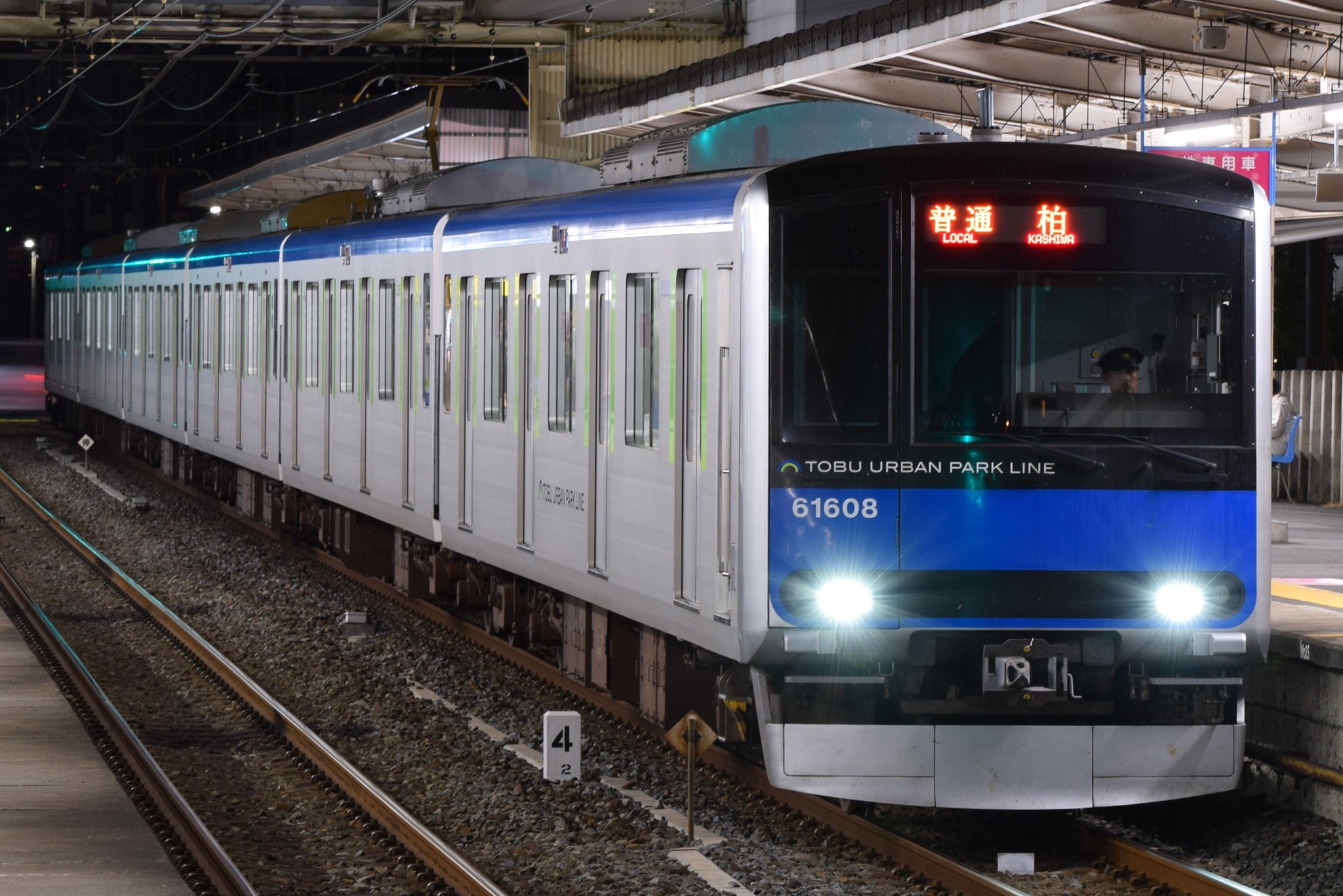 東武60000系61608F 普通柏行き